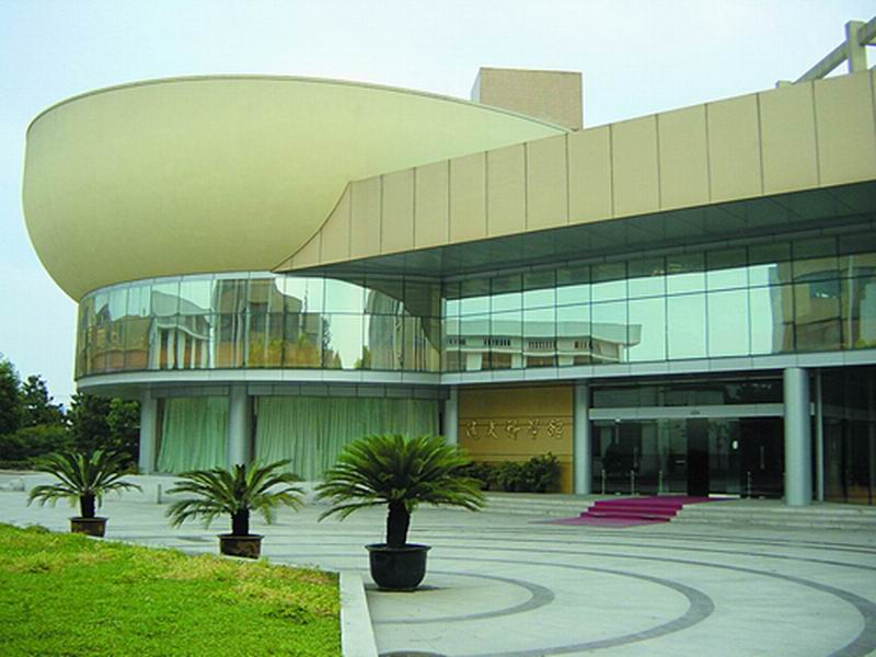 浙江工业大学逸夫科学馆